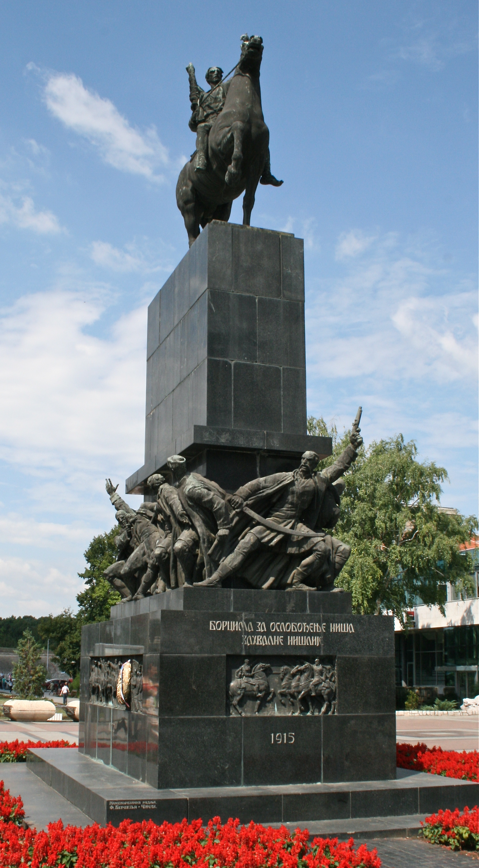 Споменик ослободиоцима Ниша